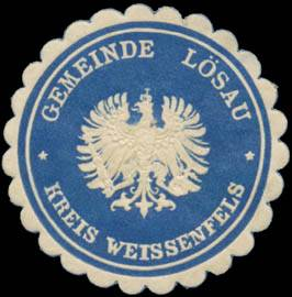 Sealing stamp Title: Gemeinde Lösau Kreis Weissenfels Description: blau, weiß, geprägt Place: Lösau size: 4 cm